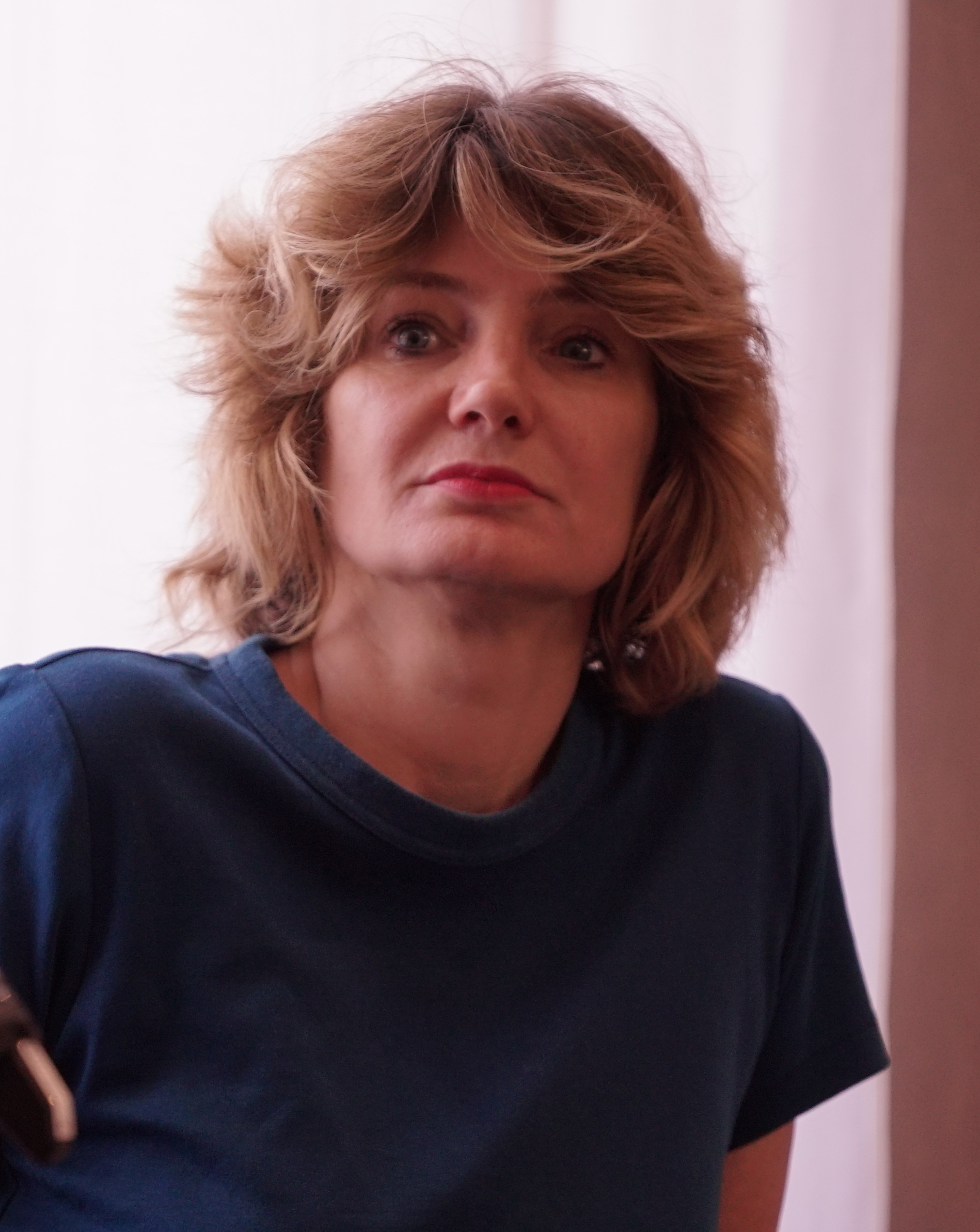 lors du "Le Livre sur la Place" en 2019.